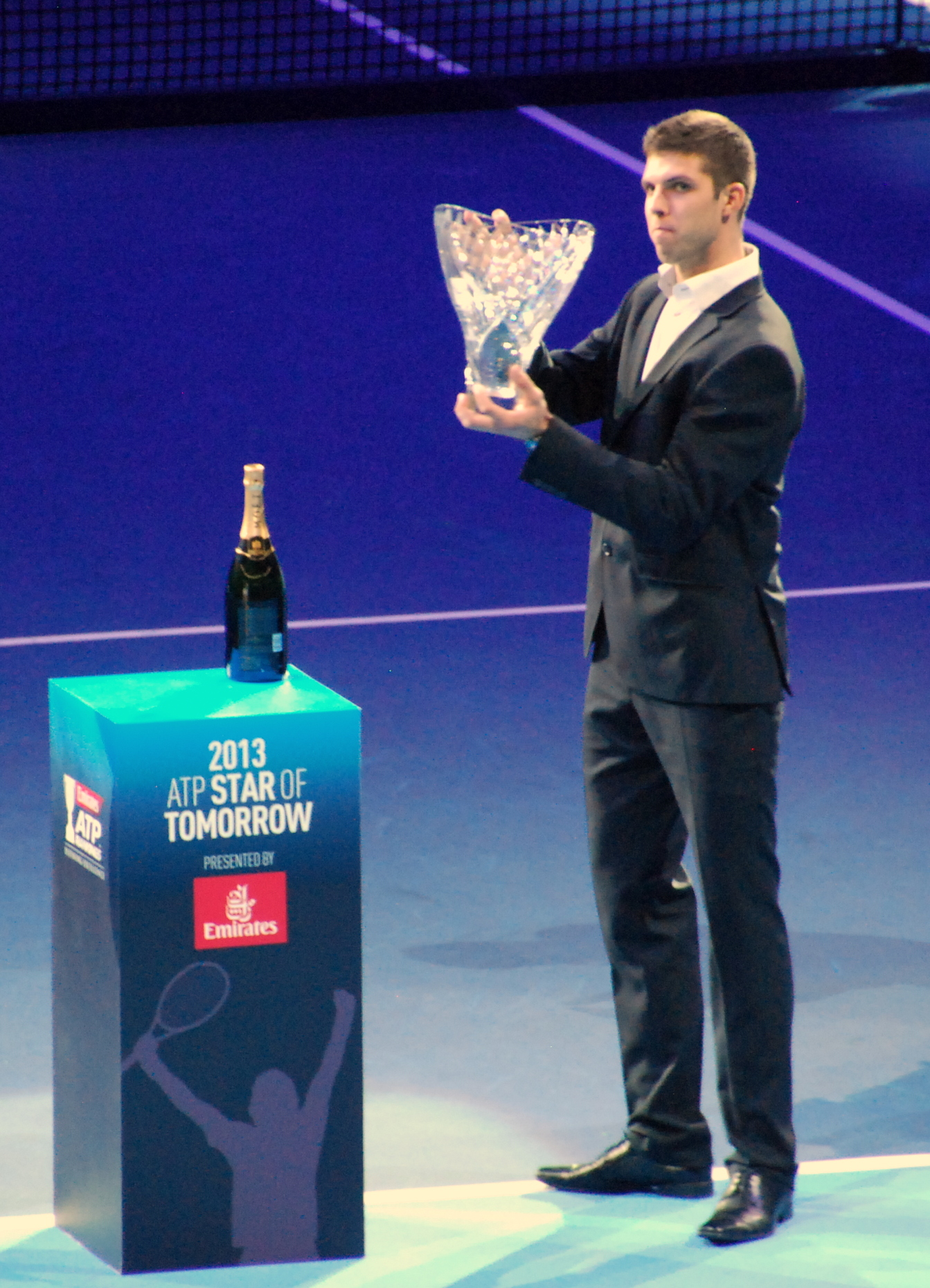 Jiri Vesely